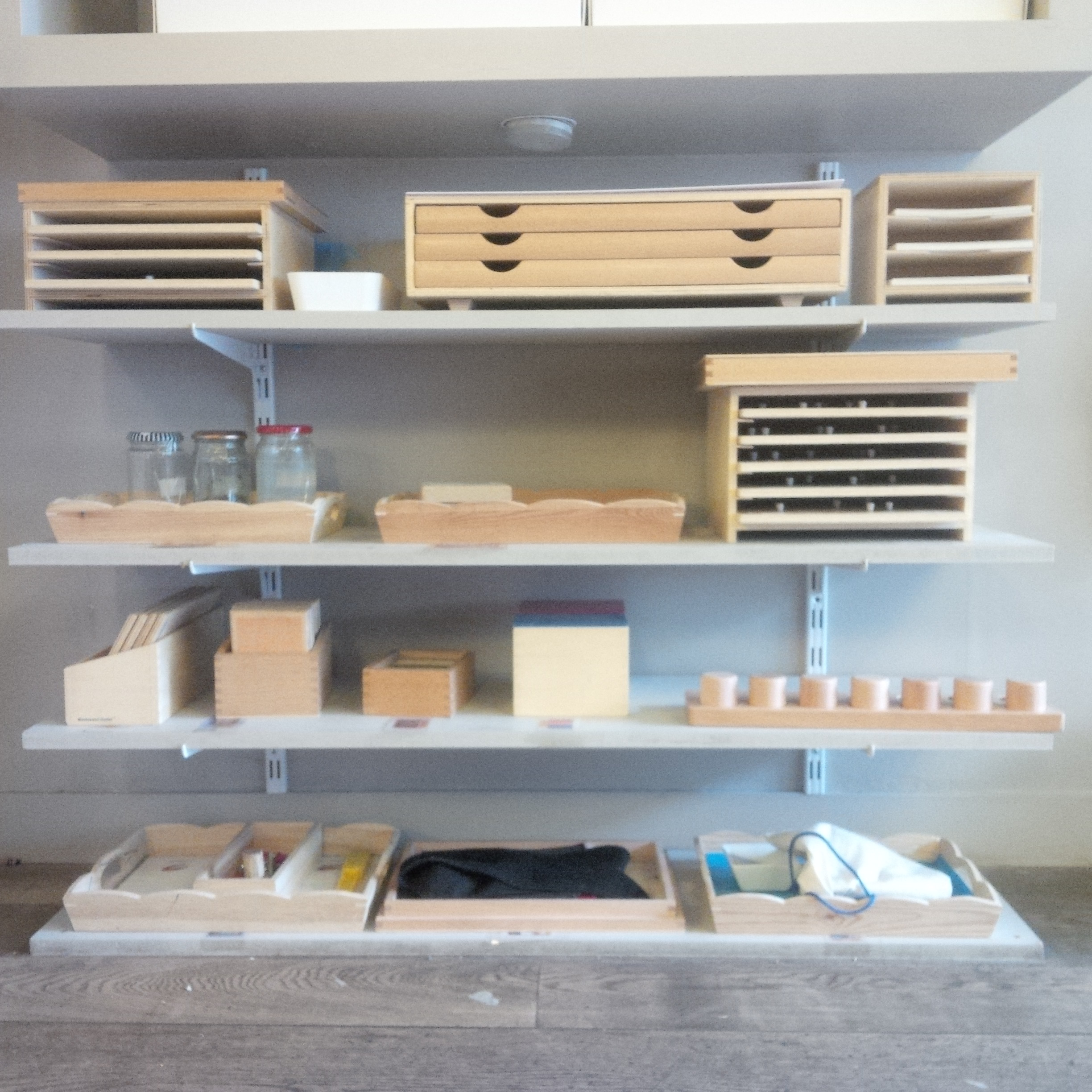 Etagères présentant le matériel Montessori dans une classe de 3 à 6 ans